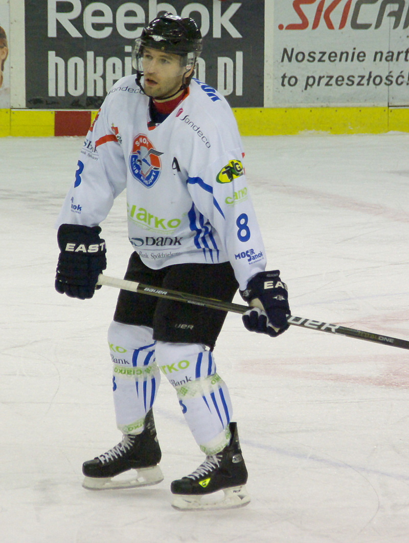 Vozdecky Martin 2012